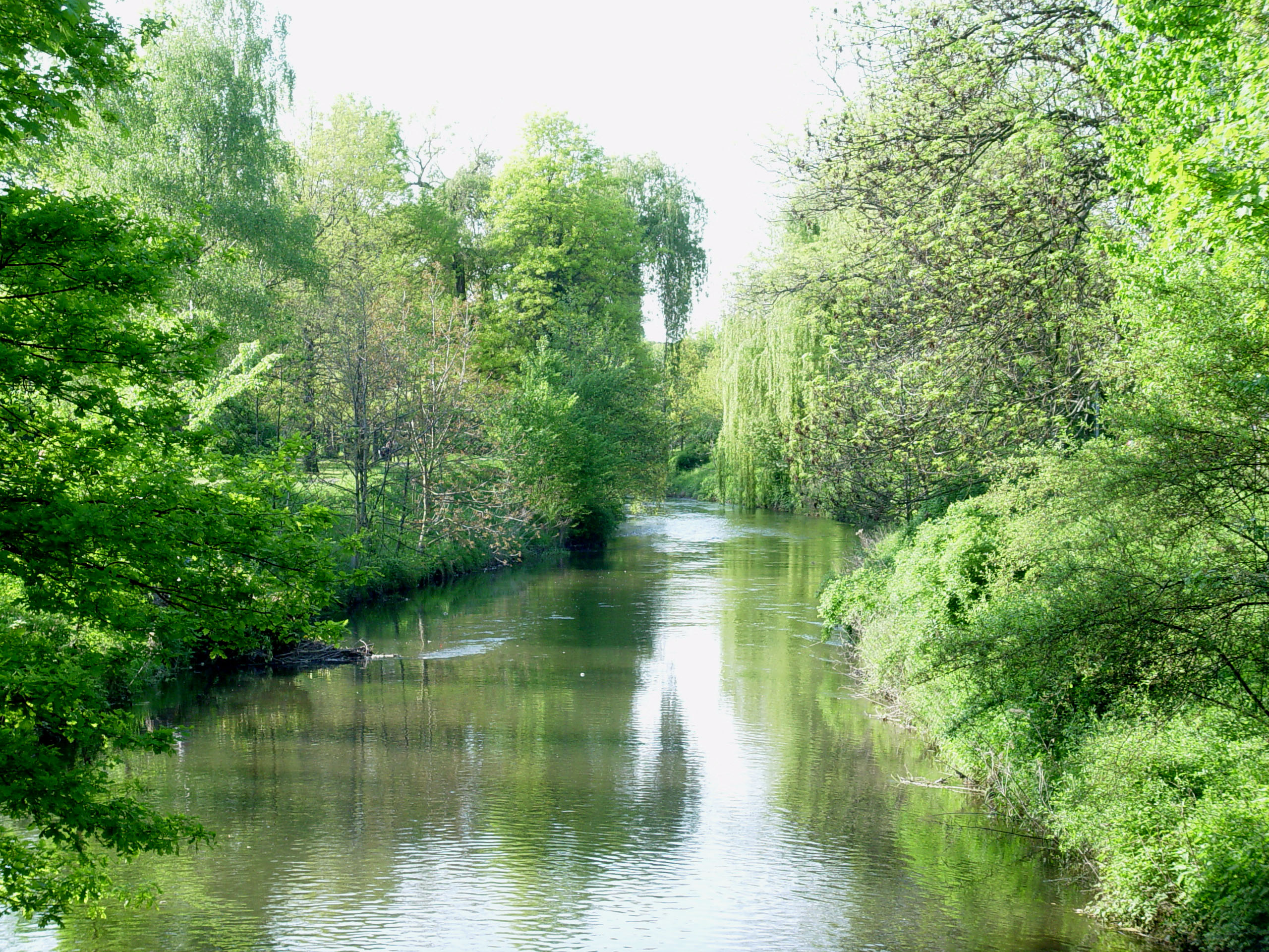 Fotografiert von Martin Dürrschnabel. Die Alb in Karlsruhe.